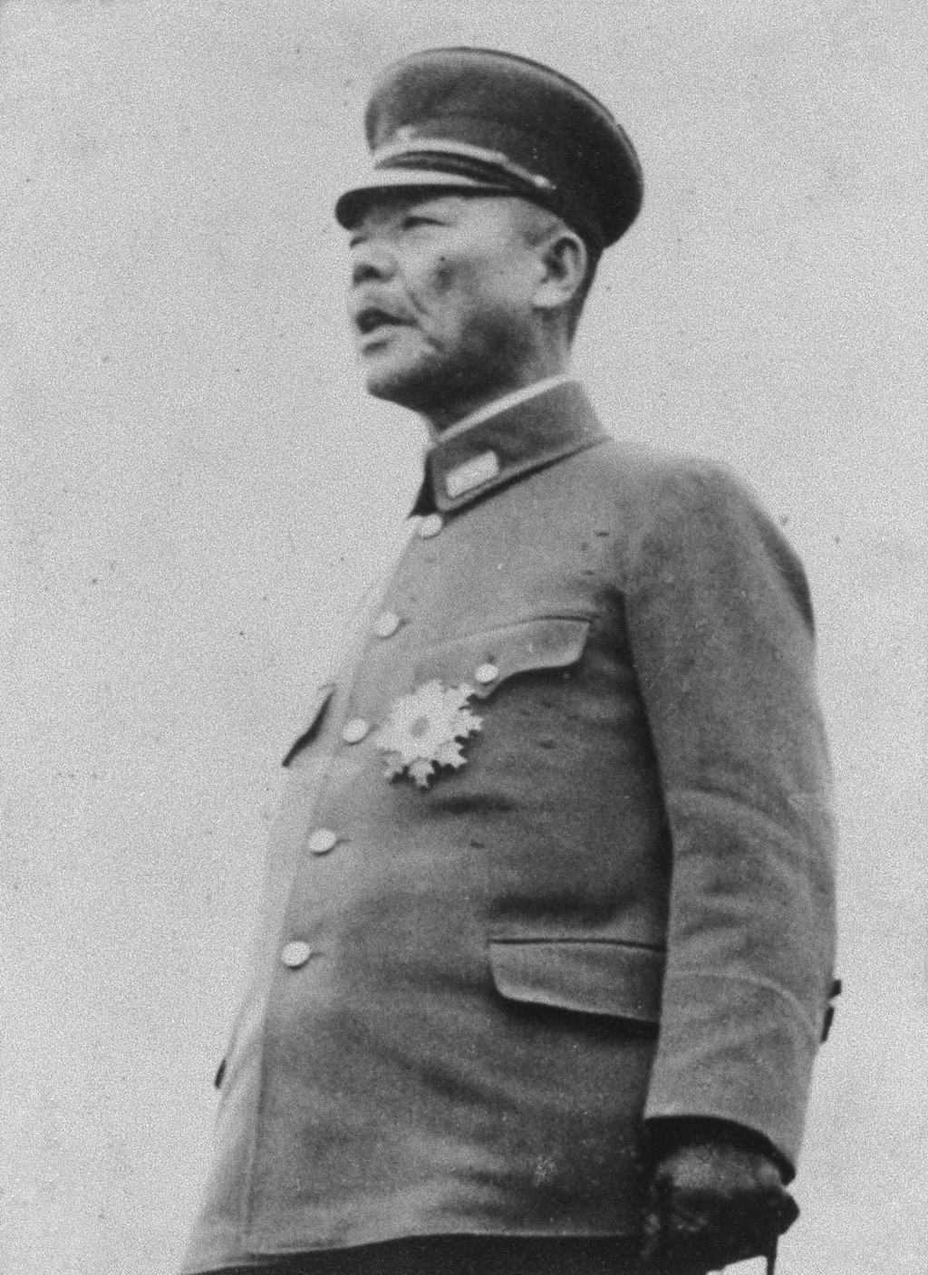 Portrait of Koiso Kuniaki (小磯国昭, 1880 – 1950)